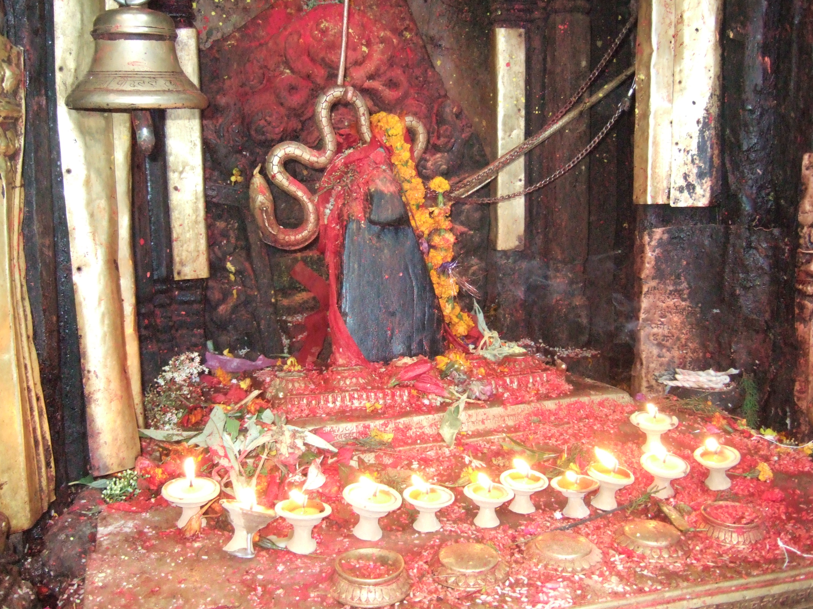 नेपाली: भिमेश्वोर को प्रतिमा